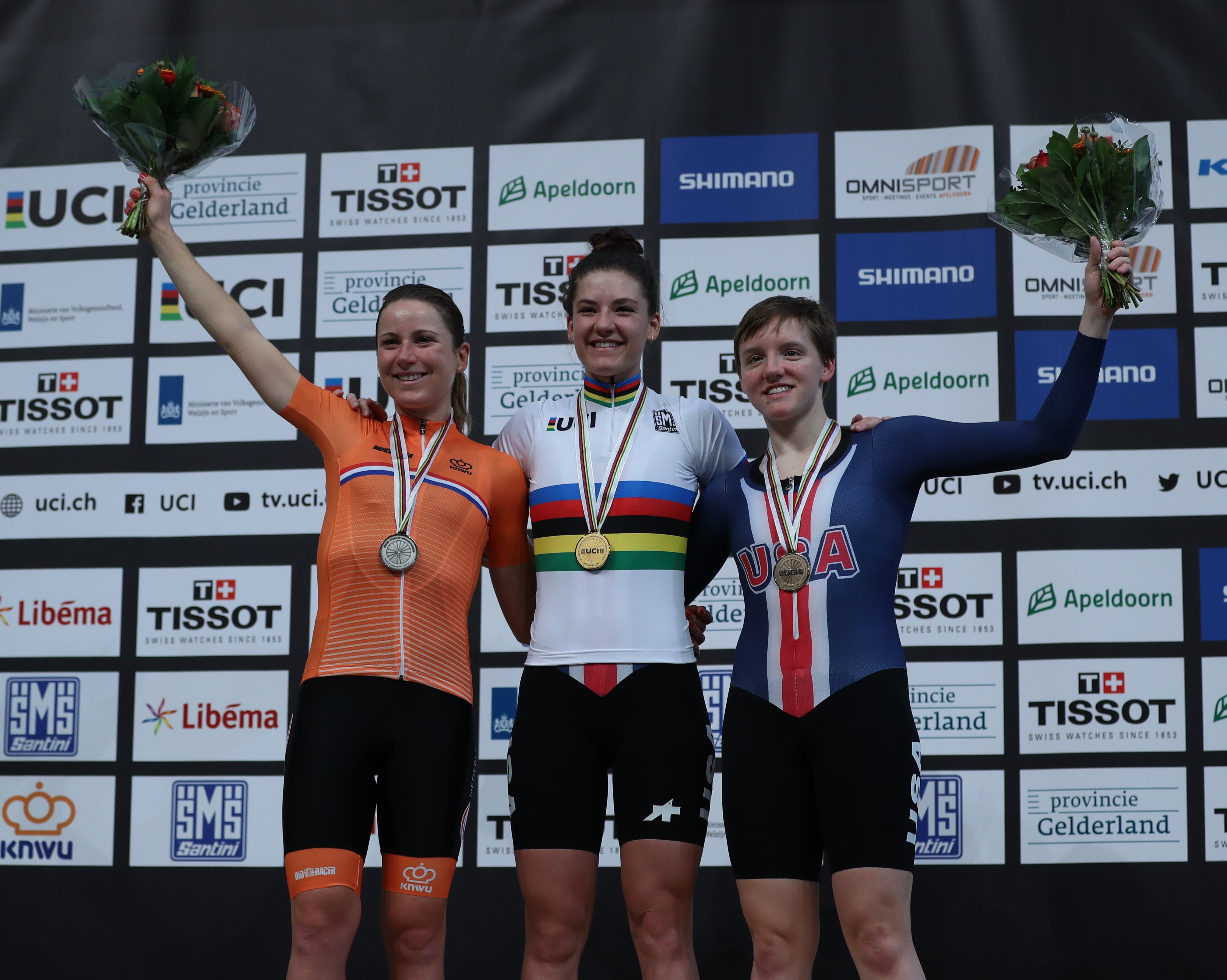 Podium Einerverfolgung (v.l.n.r.): Annemiek van Vleuten, Chloé Dygert, Kelly Catlin